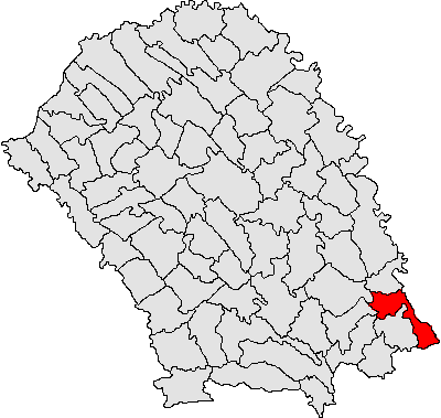 Categorie:Hărţi ale judeţului Botoşani